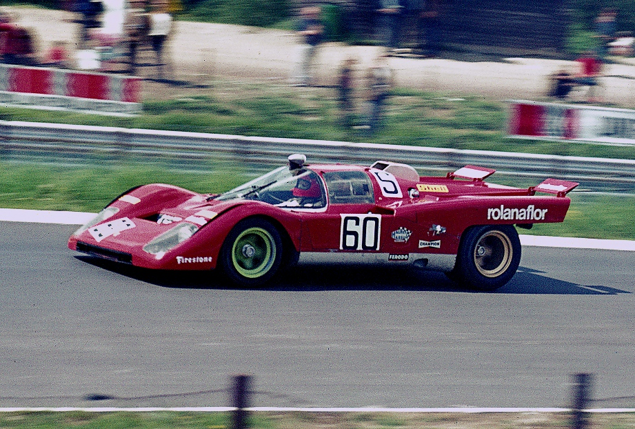 Bildbeschreibung: Ferrari 512M - Fahrer: Herbert Müller Fotograf: Lothar Spurzem Datum: 29-05-1971 beim Training zum ADAC-1000-km-Rennen auf dem Nürburgring